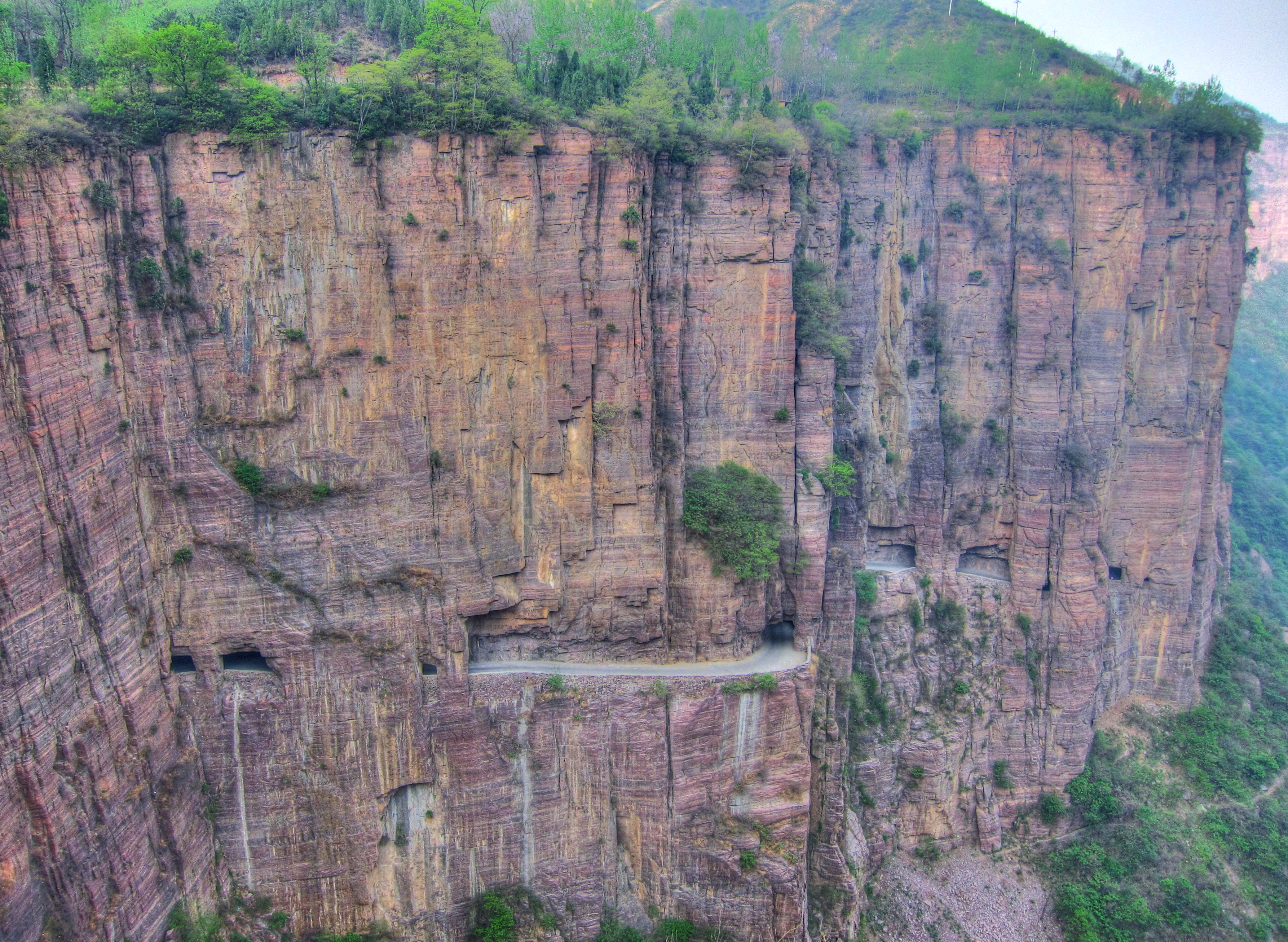 Guoliang tunnel road